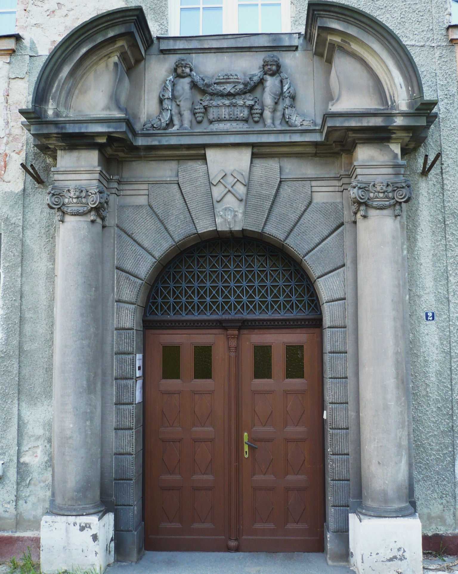 Nowa Ruda, ul. Szpitalna 2 - Szpital bracki (górniczy), 1911